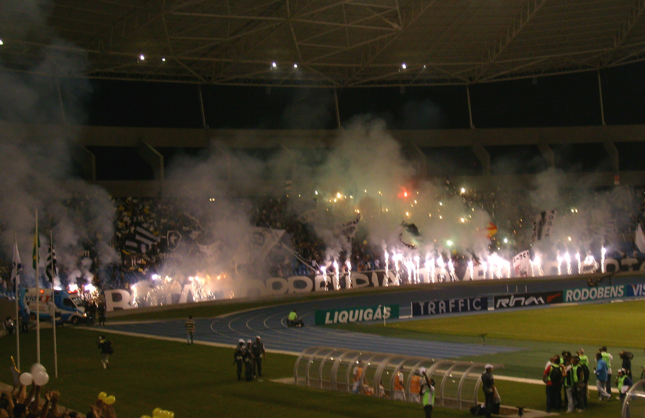 Fúria Jovem do Botafogo, torcida organizada, recebe o Botafogo FR na partida contra o Corinthians, válida pelo primeiro jogo semifinal da Copa do Brasil de 2008, em 20 de maio deste ano, no Engenhão.